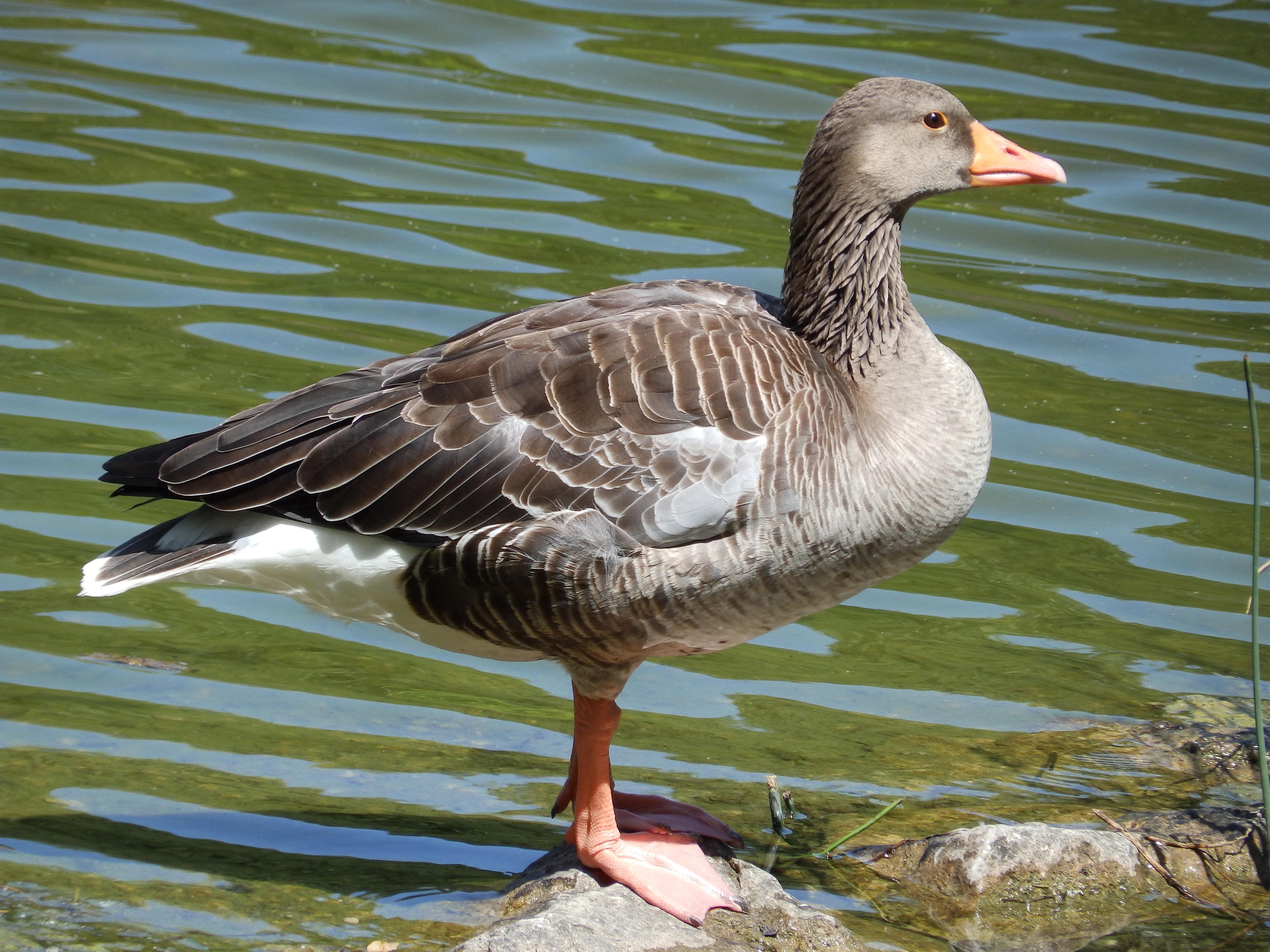 Eine Stockente Graugans entspannt sich auf einen Felsen